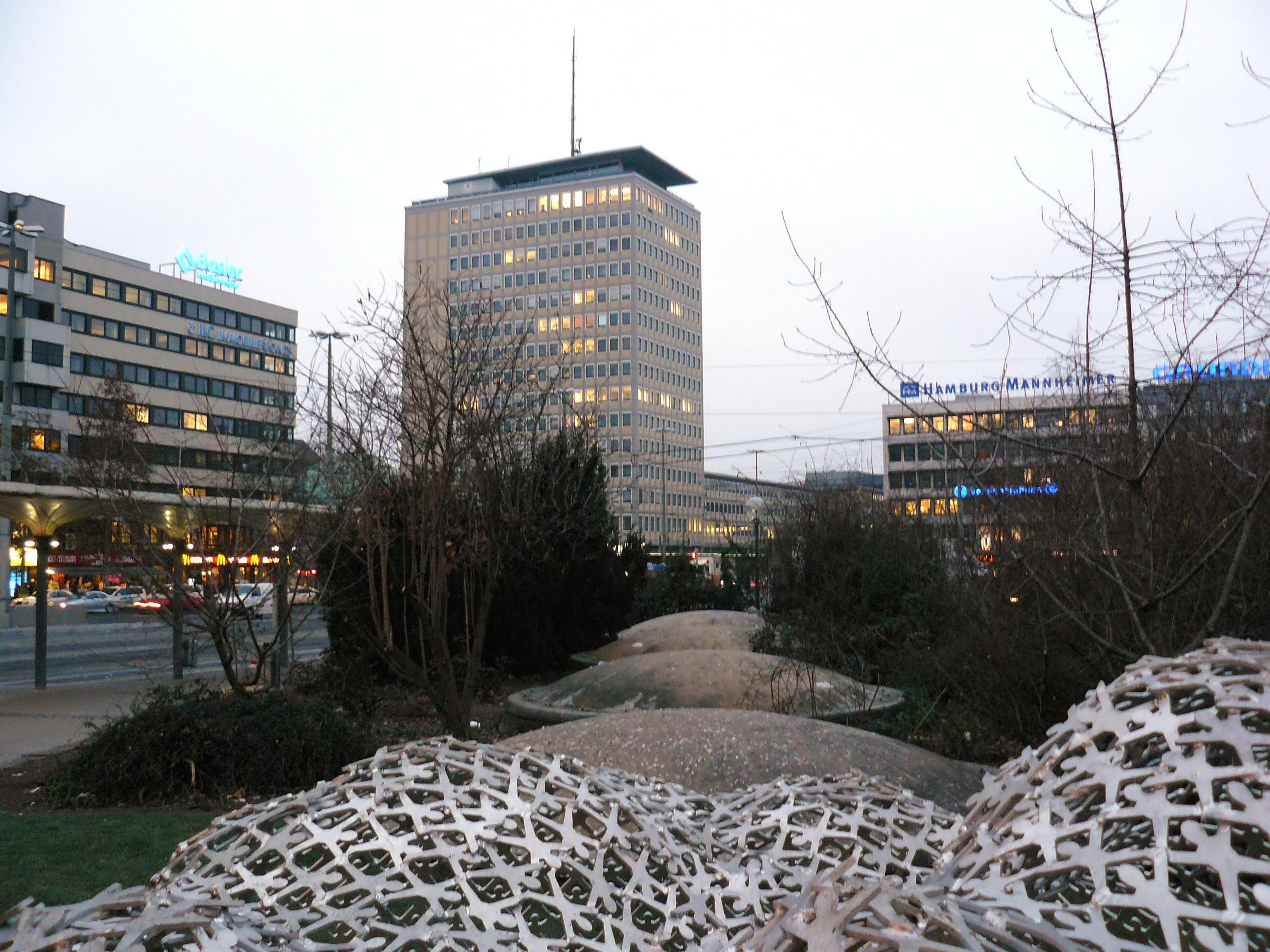 Nürnberger Plärrer. Im Vordergrund die Lichtkuppeln des U-Bahnhof Plärrer mit dem Kunstwerk “Transit”. Hinten das Plärrerhochhaus.